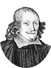 Johann Andreas Piccart, théologien allemande.